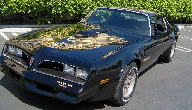 1978 Pontiac Firebird